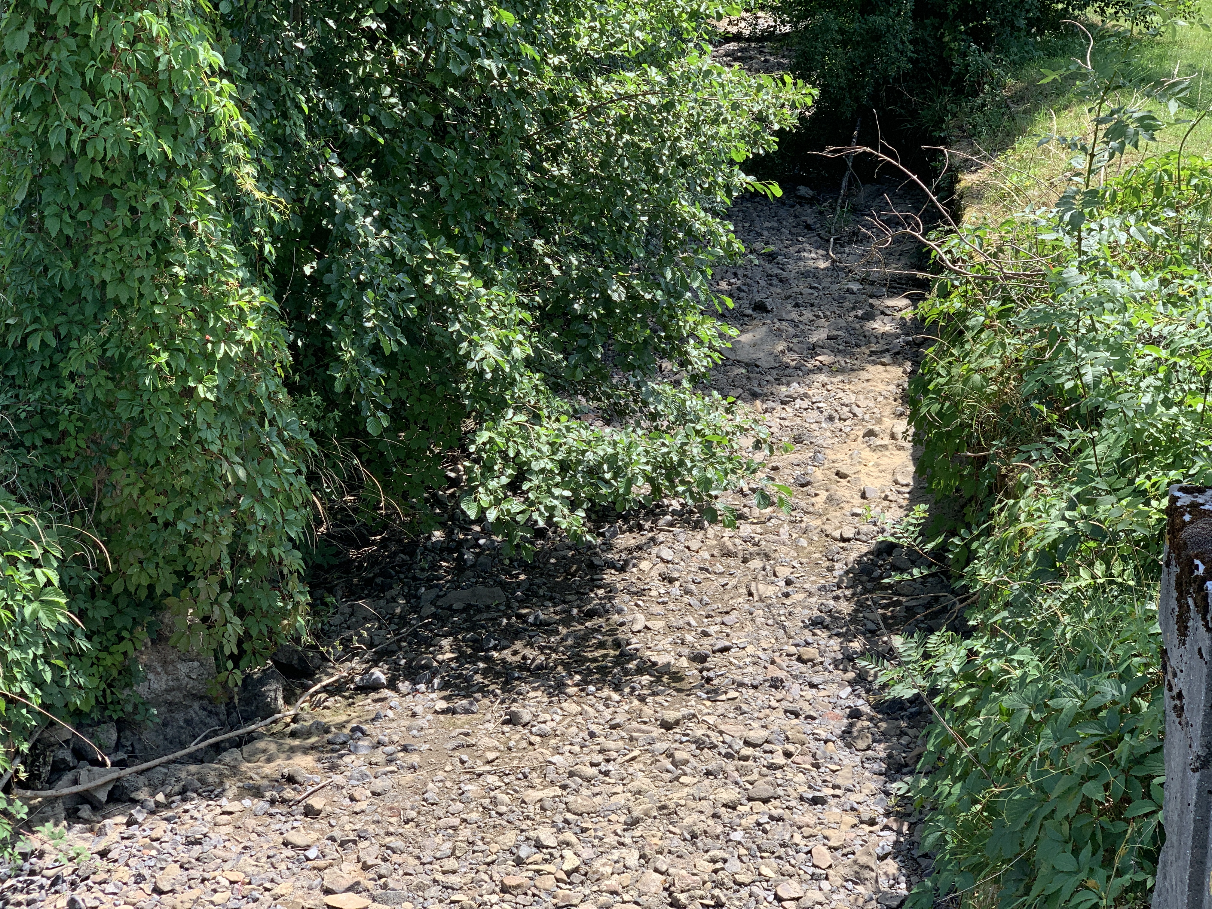 La Petite Grosne sans eau, Prissé.